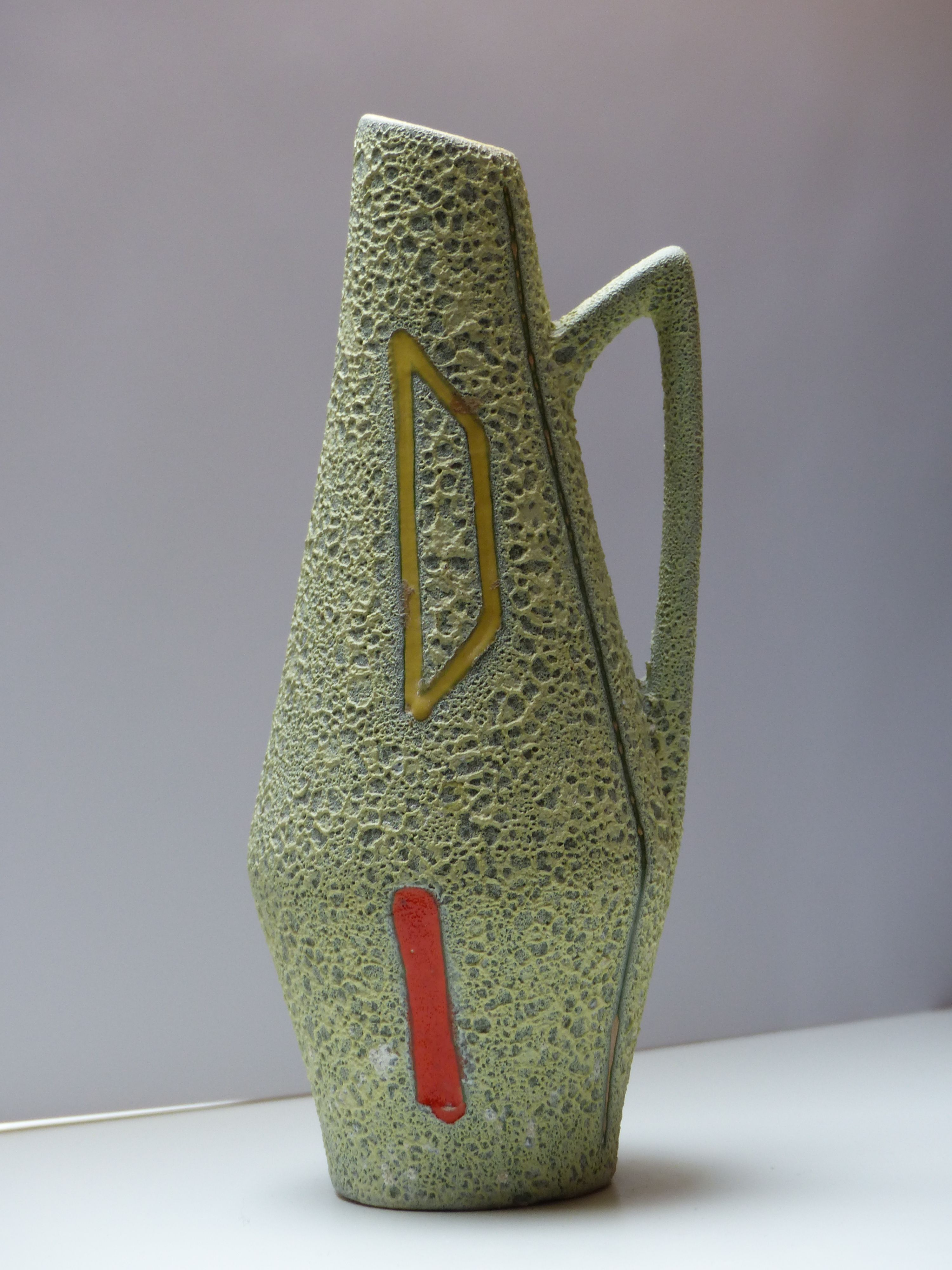 Scheurich-Vase, Modellnummer 271; Höhe 22 cm. sonstige Inschriften auf der Vase: „FOREIGN“